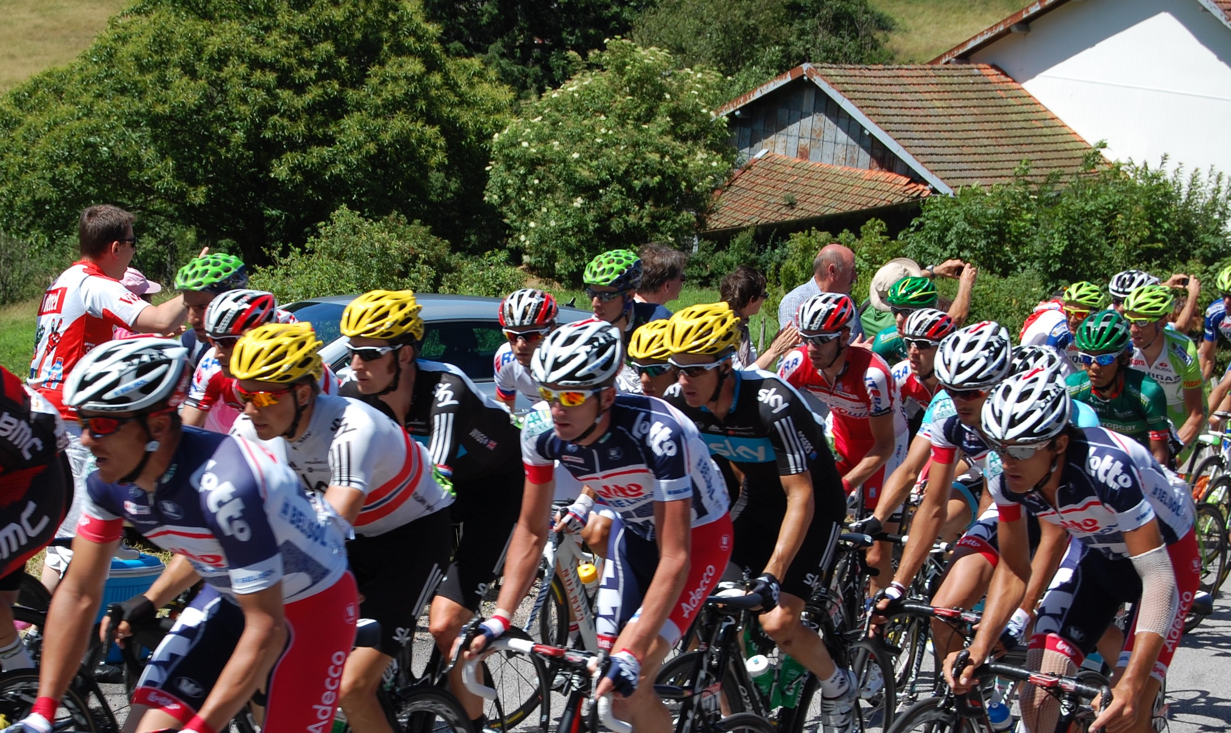 7e étape du Tour de France 2012, passage du peloton au bas du col de Grosse Pierre.